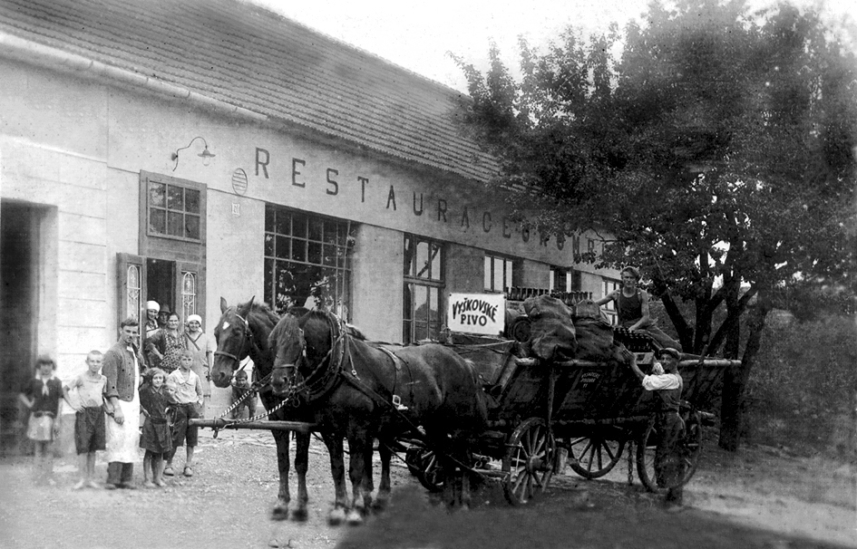 koňský povoz do přelomu 20. století (Pivovar Vyškov- czech republic)